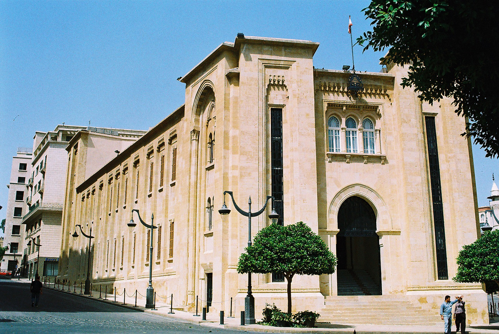 Alles hübsch und fancy... Beirut / Libanon 2003